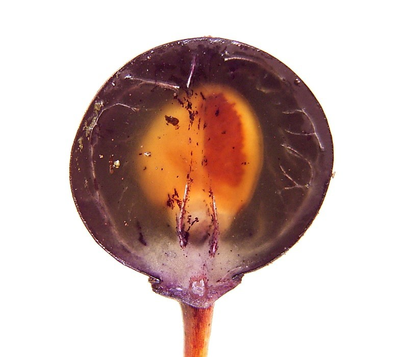 Rhamnus frangula